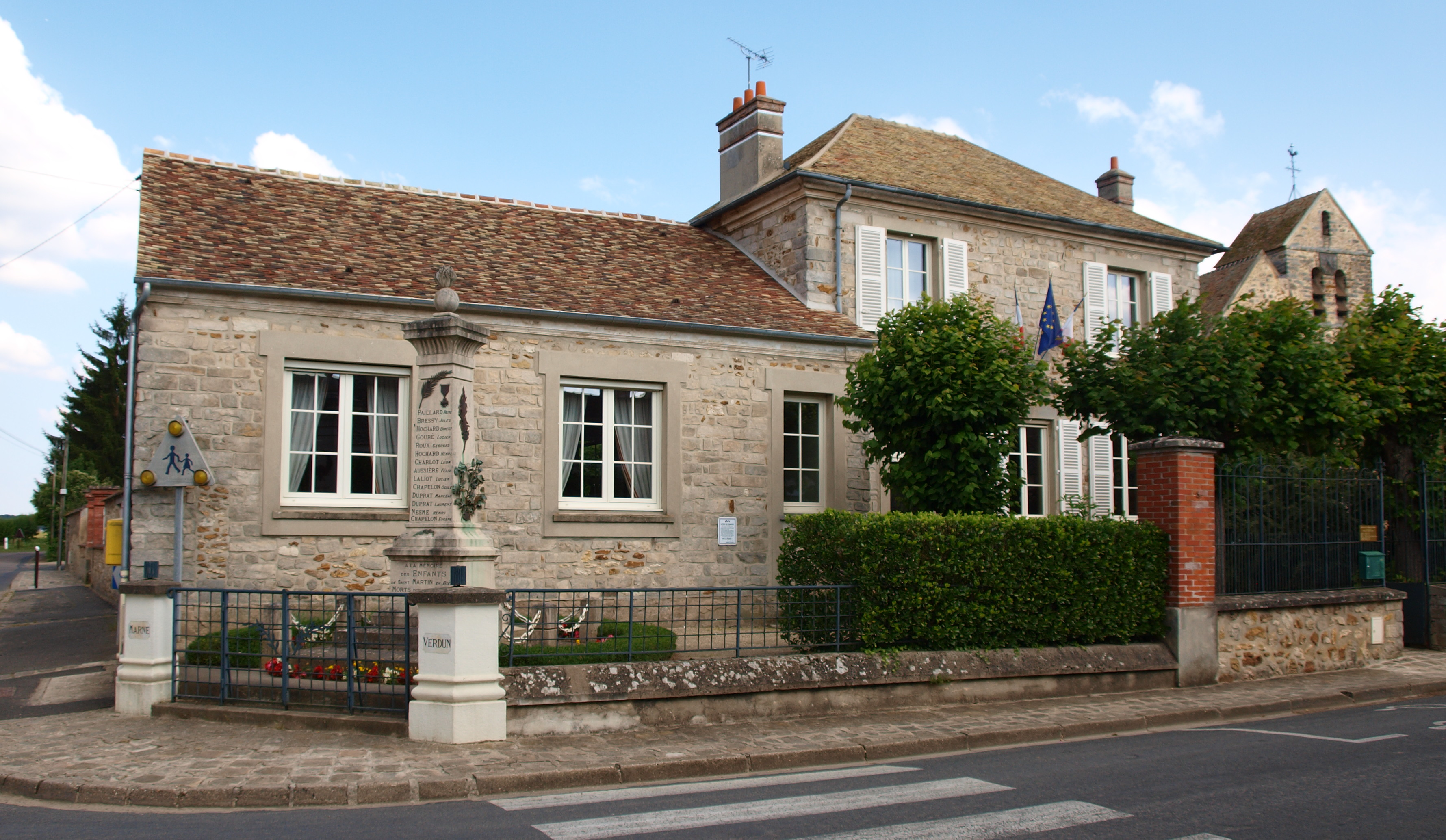 Saint-Martin-en-Bière (Seine-et-Marne, France)